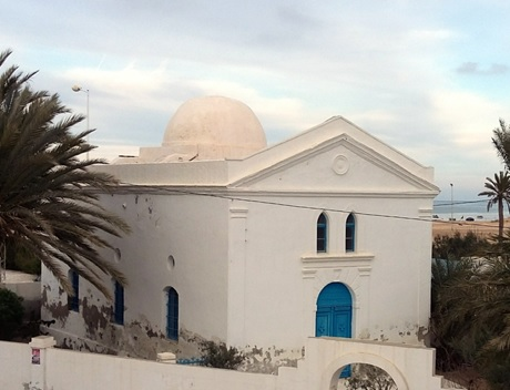 djerba